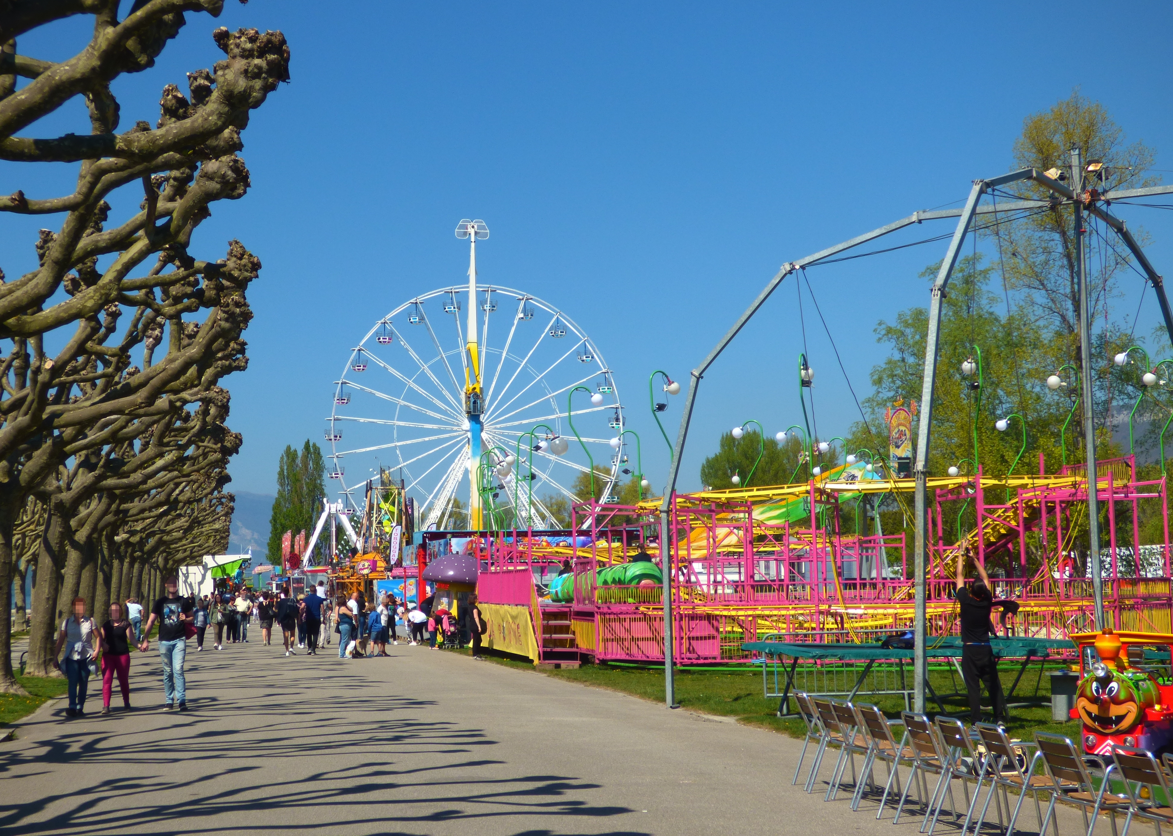 La fête foraine de printemps Méga Park au nord de l'esplanade du lac du Bourget à Aix-les-Bains (Savoie).